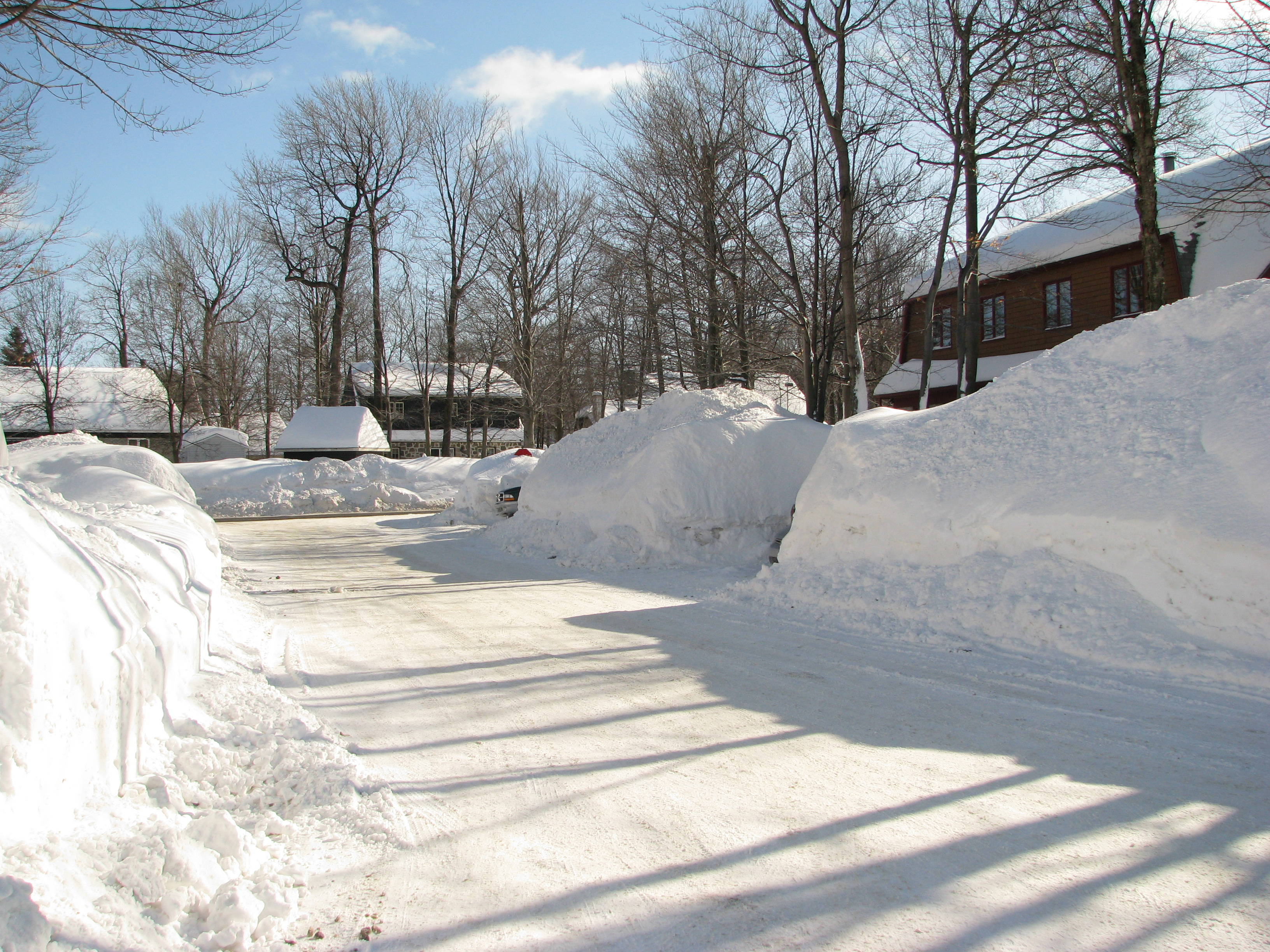 Neige poussée ou soufflée sur les terrains d'une rue résidentielle de Saint-Augustin-de-Desmaures, Québec, en février 2008. Plus de 340 cm sont tombés sur la région de Québec jusqu'à maintenant, alors que la normale est de moins de 300 pour tout l'hiver.